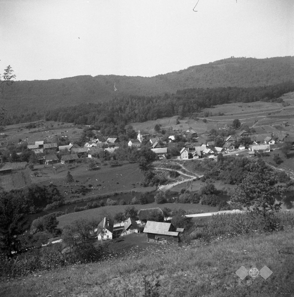 Stavča vas.